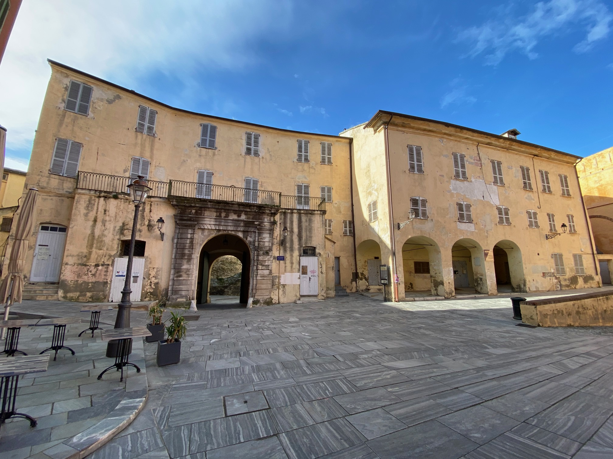 Corsu: U Palazzu di i Nobili Dodeci, in u quartieru di a Citatella, in Bastia